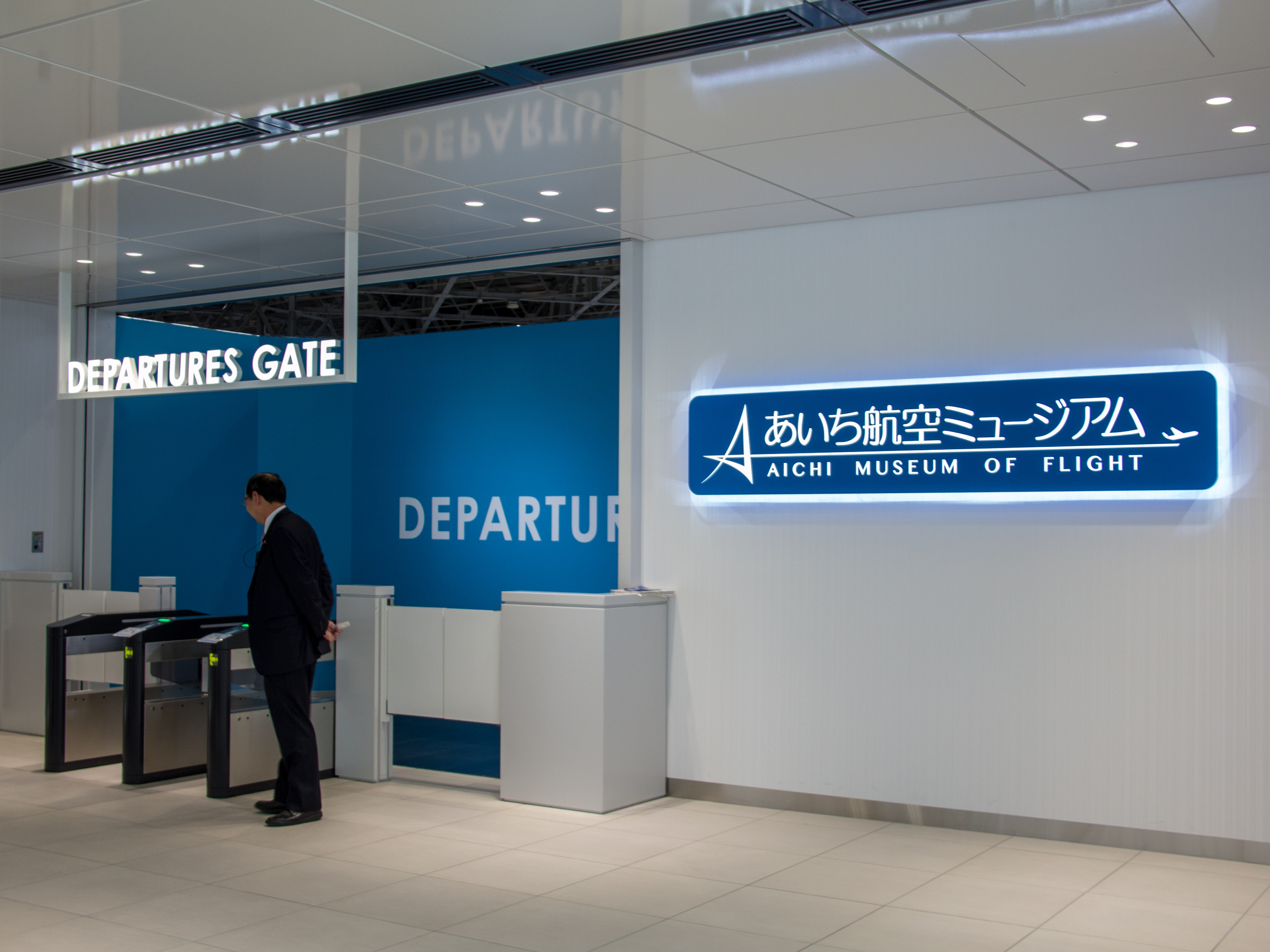 あいち航空ミュージアム入り口